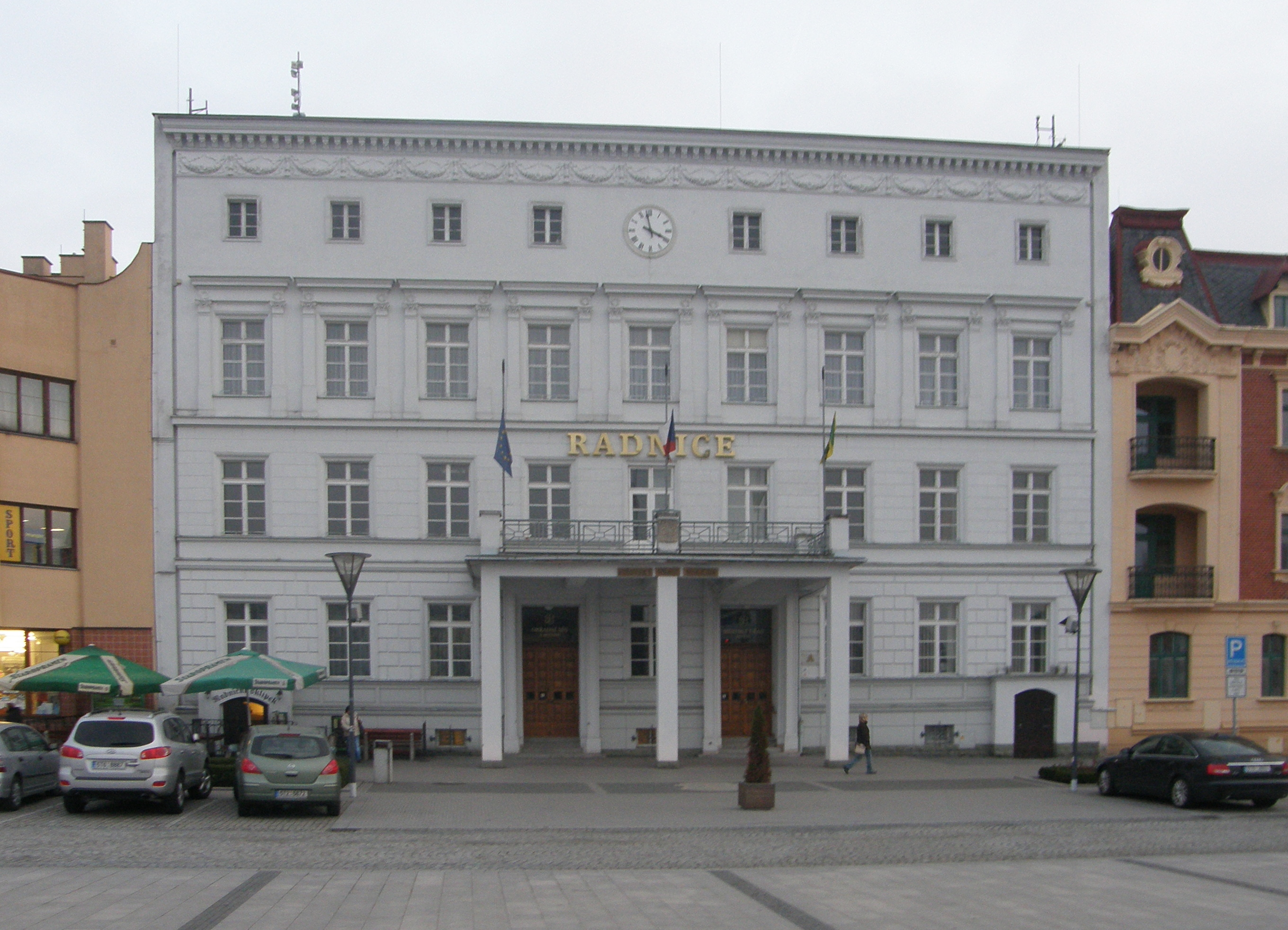 Městská radnice v Hlučíně